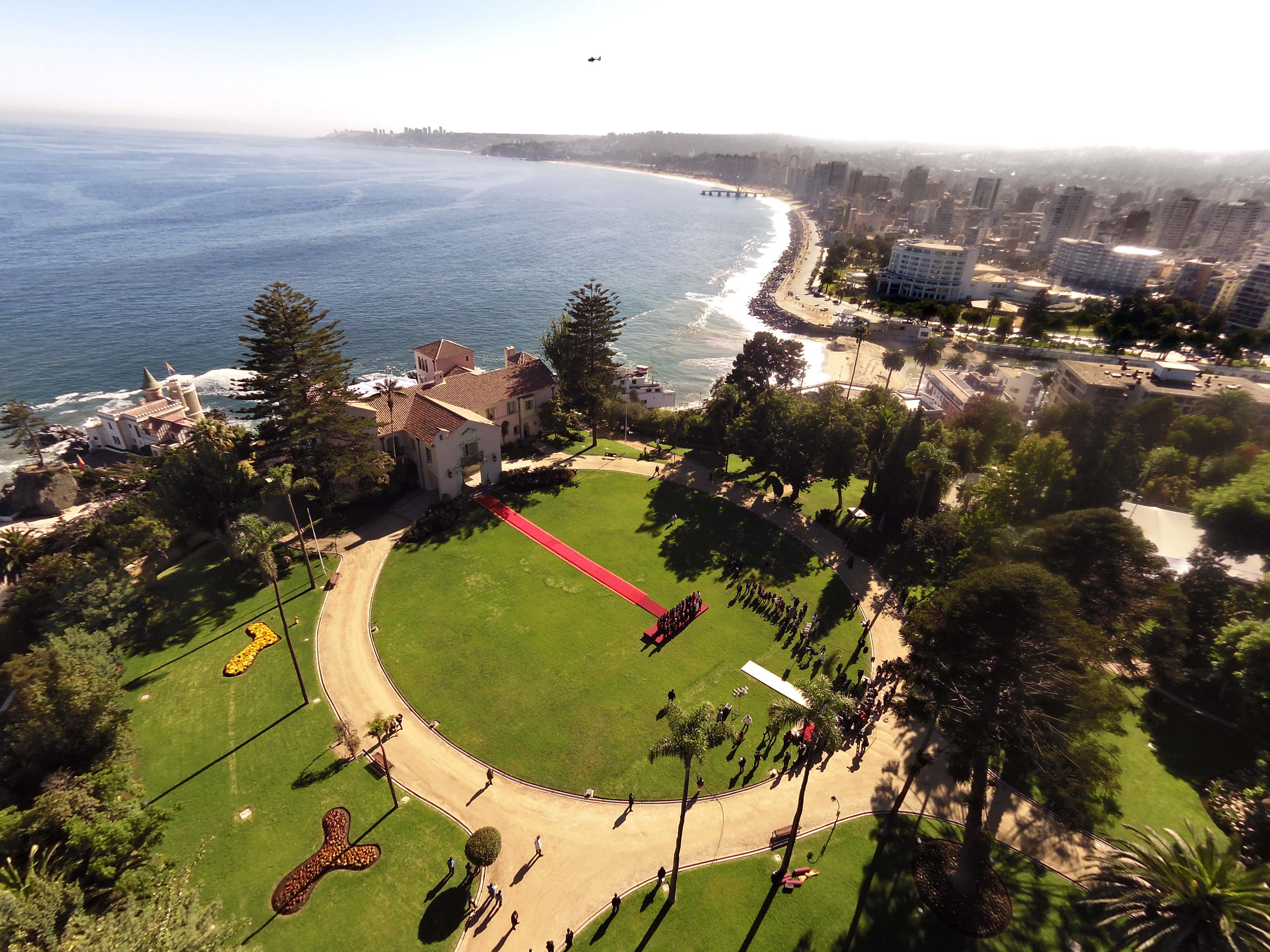 El 11 de marzo visto desde el aire.